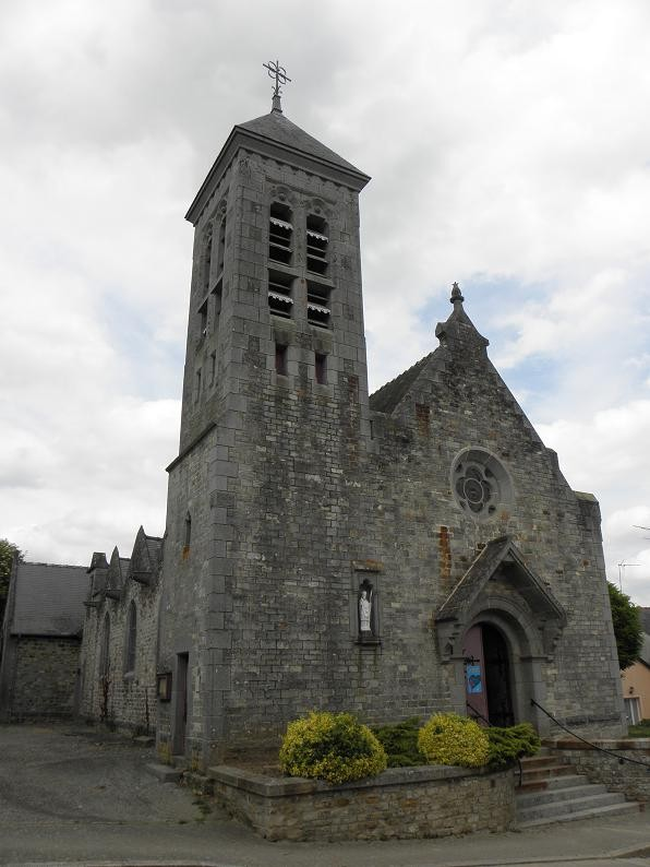 Extérieur de l'église Saint-Melaine de Mouazé (35).